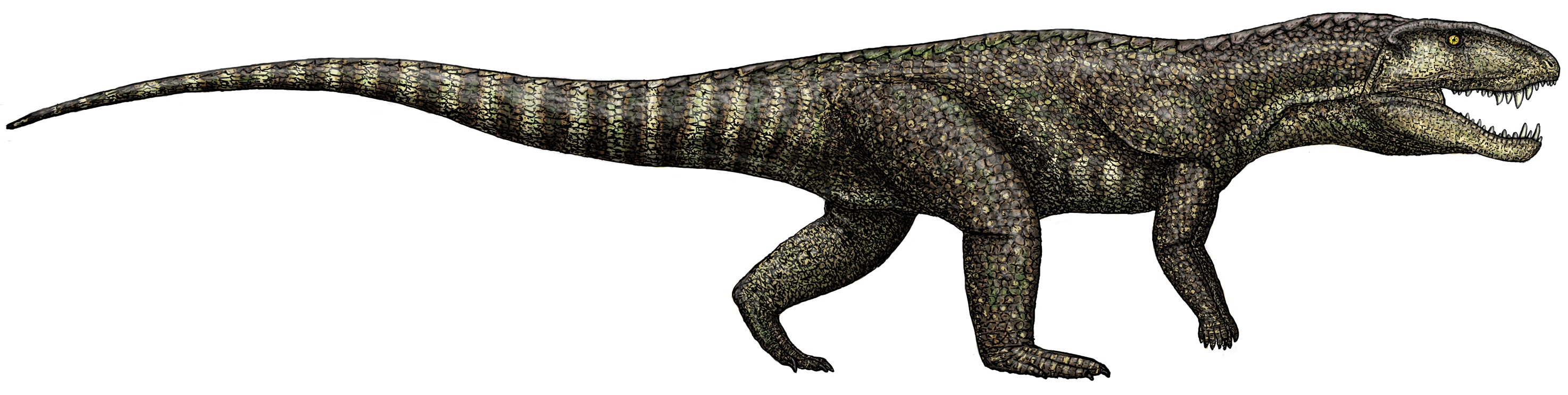 Credit Dr. Jeff Martz/NPS